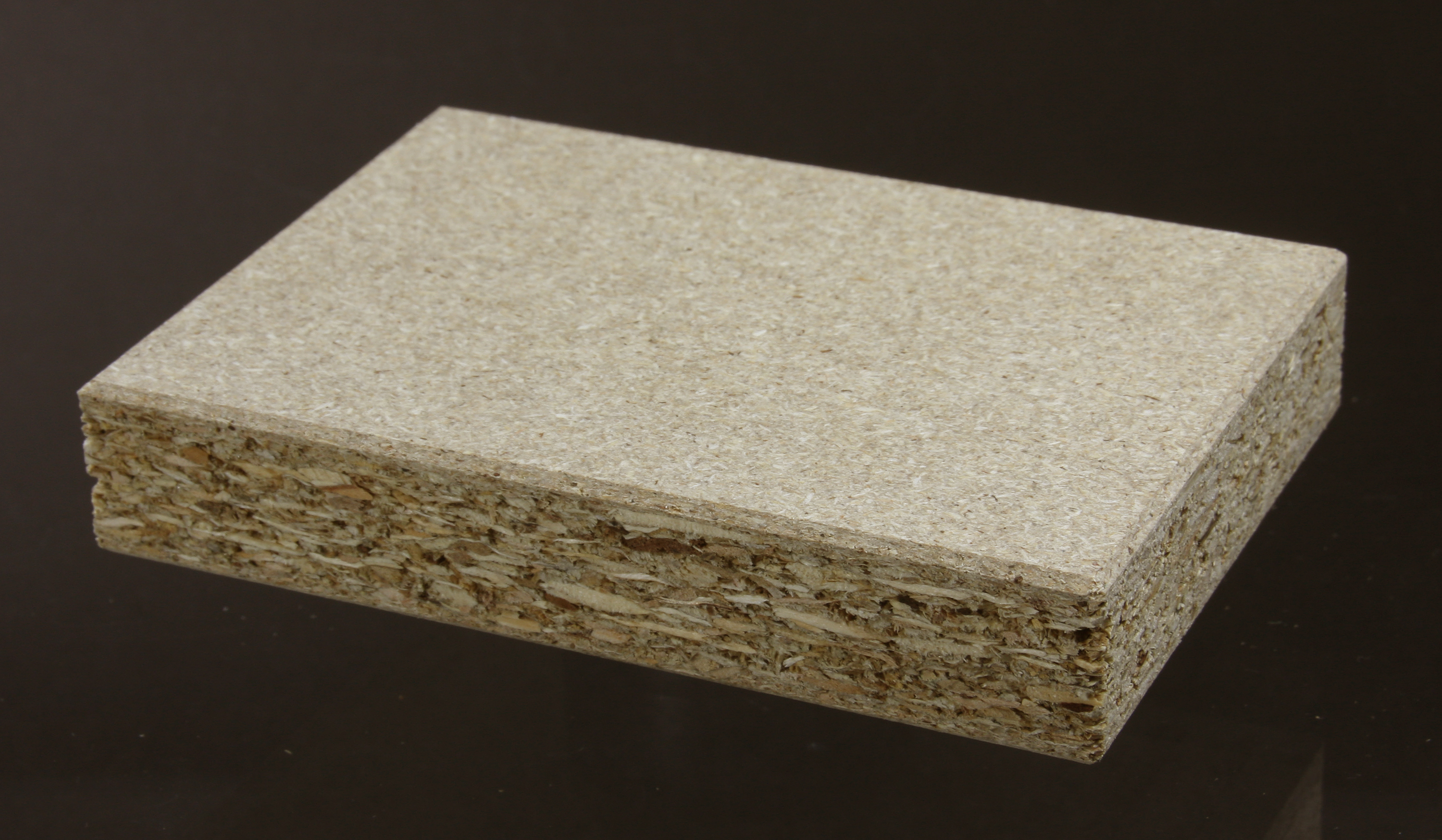 Spanplatte